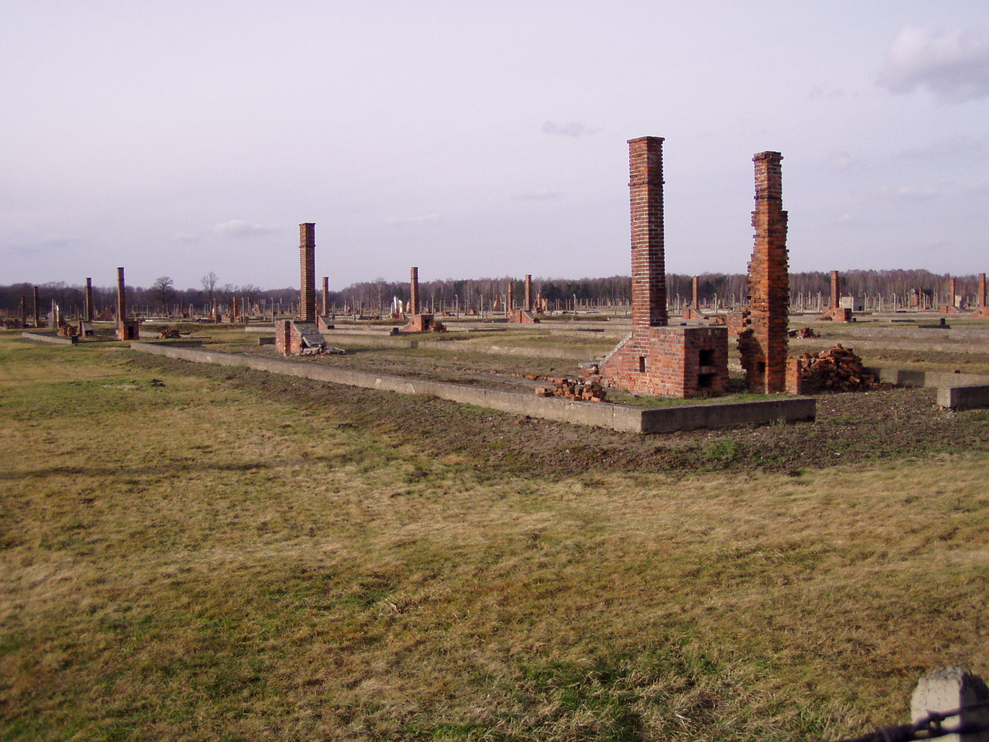 BIIb section in Birkenau camp Úsek BIIb v Birkenau